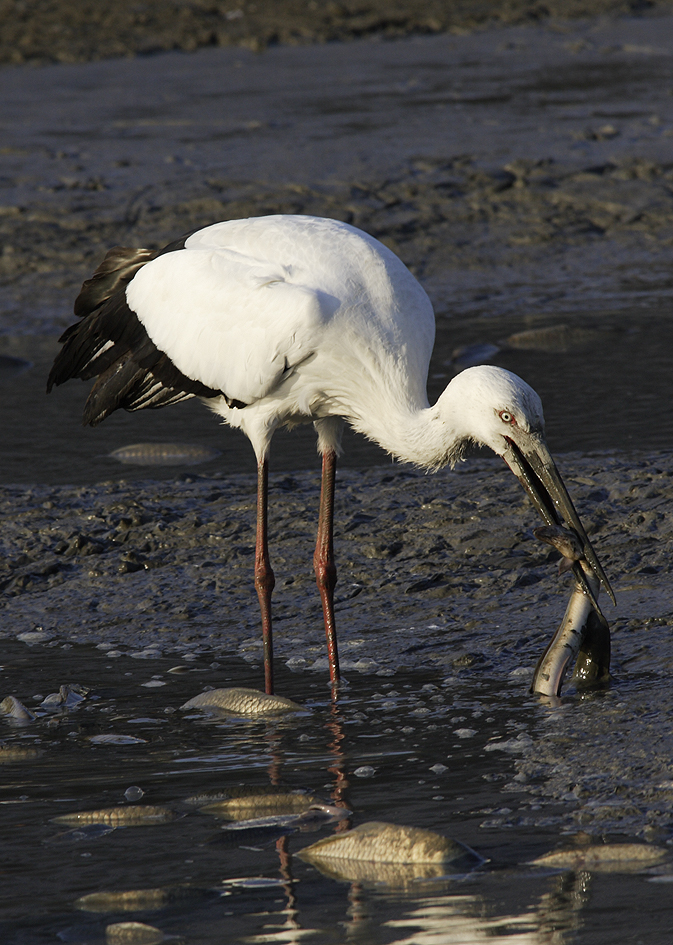 コウノトリ 香川県丸亀市 うなぎを丸呑み1